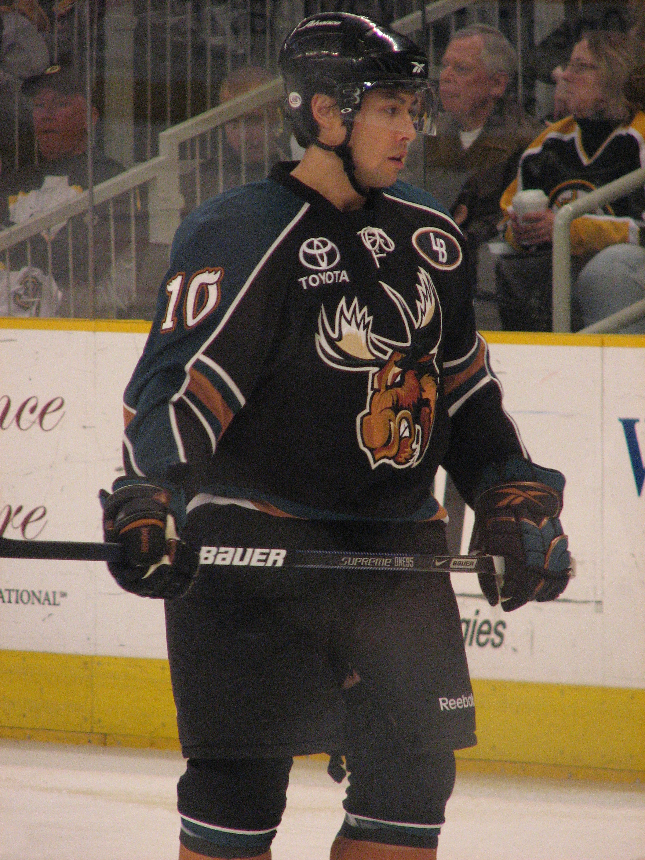 #10 Jason Krog, Manitoba Moose